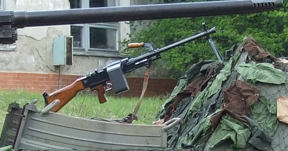 Czech machine gun Vz. 59